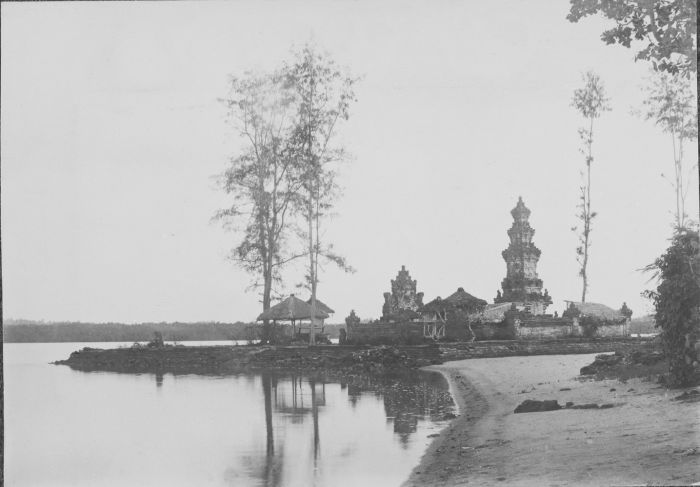 foto. De Pura Sakenan op het eiland Serangan, Bali